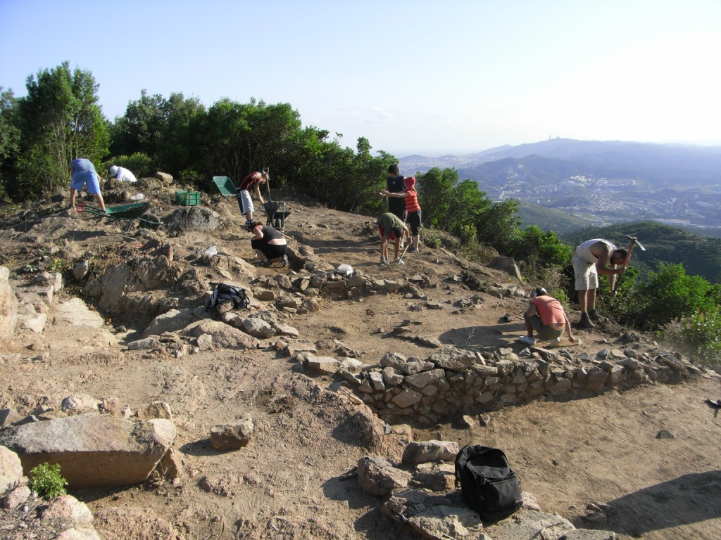 Maleses 08'